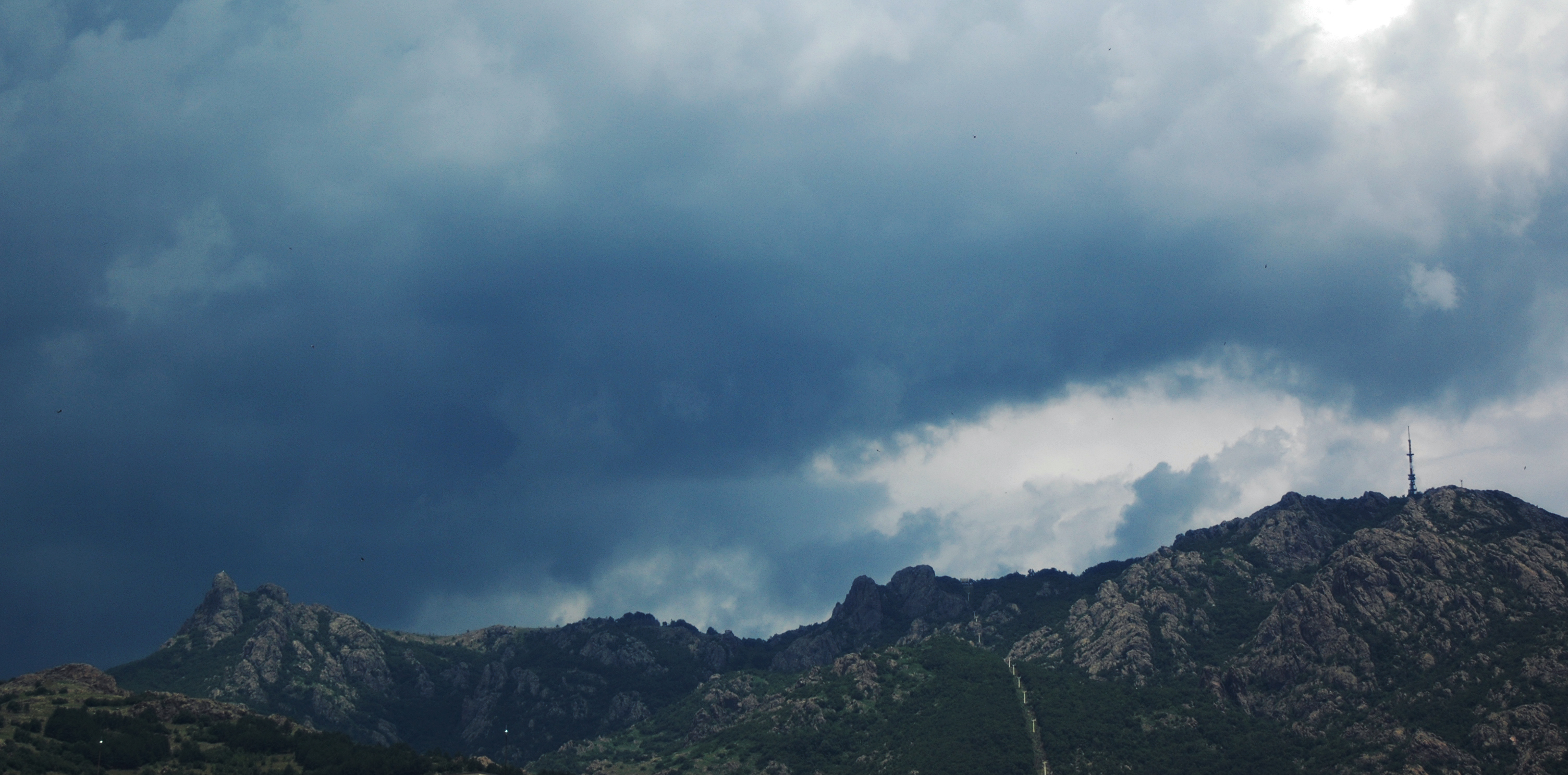 Панорамен изглед към м. Карандила